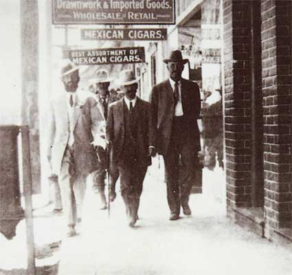 Roque González Garza (izquierda) y Francisco I. Madero (centro) durante su exilio en San Antonio, Texas. La imagen debió ser tomada en es:1910 y por lo tanto se considera parte del dominio público en los Estados Unidos. [1]